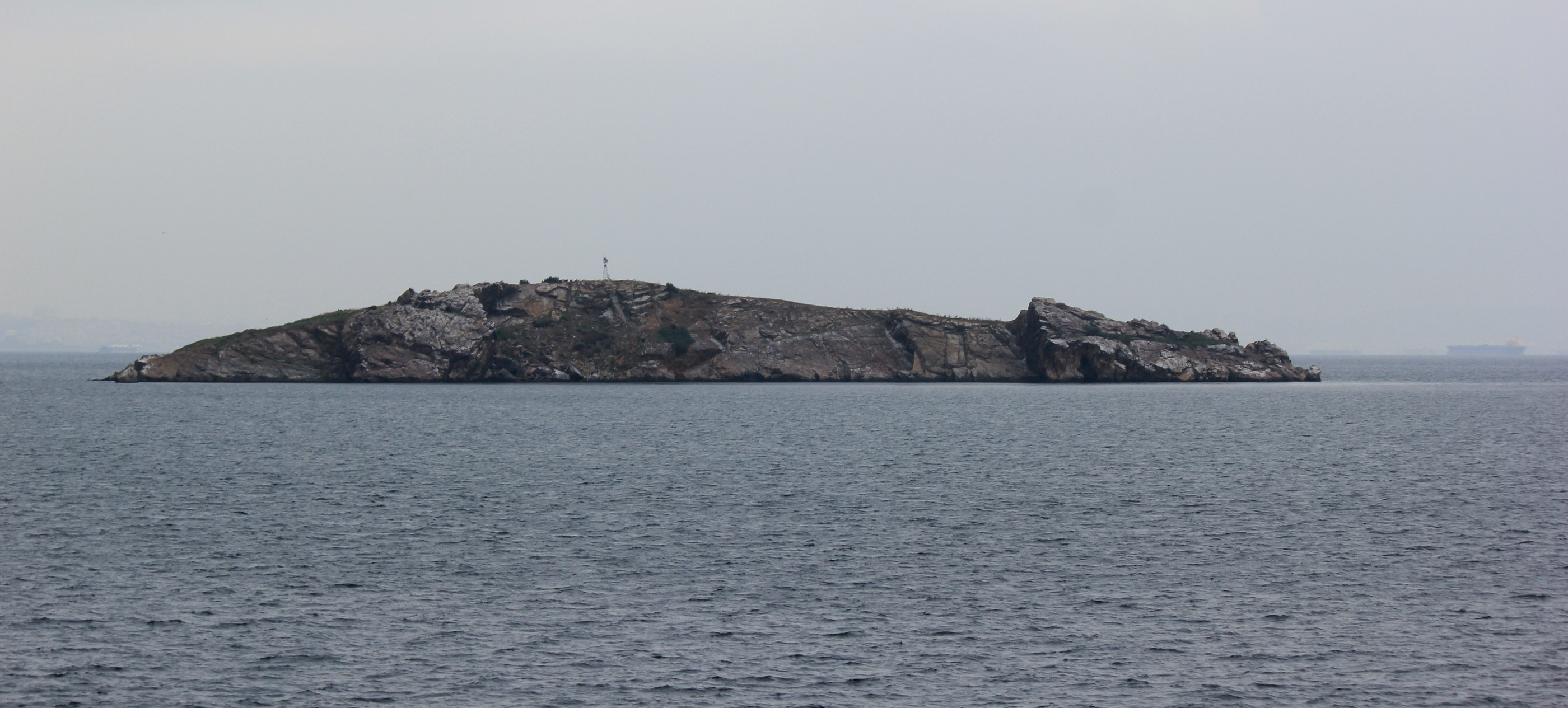 Tavşan Adası, die kleinste der Prinzeninseln im Marmarameer vor Istanbul.